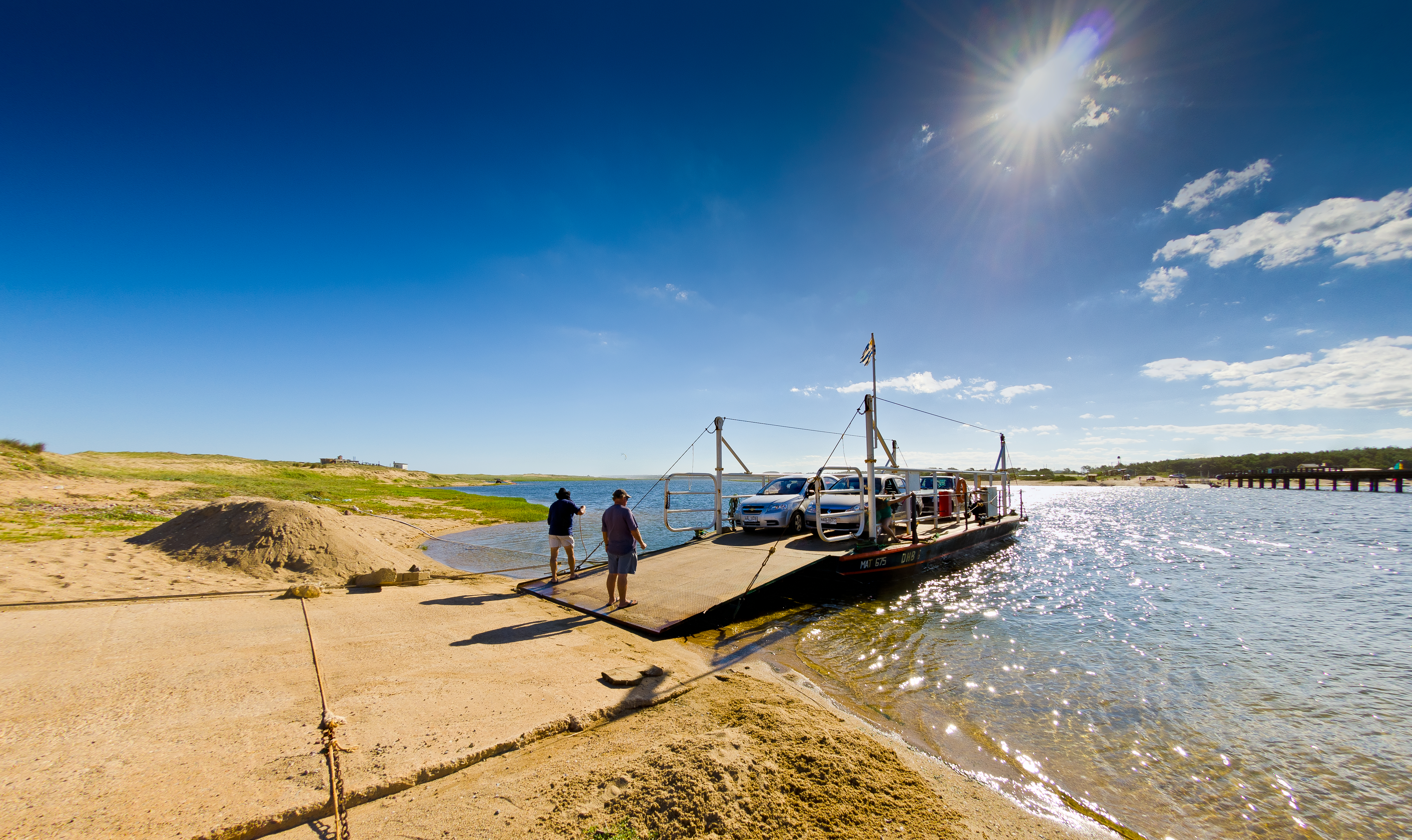 Laguna Garzón vista de la balsa que se usa para cruzar la desembocadura de la laguna.